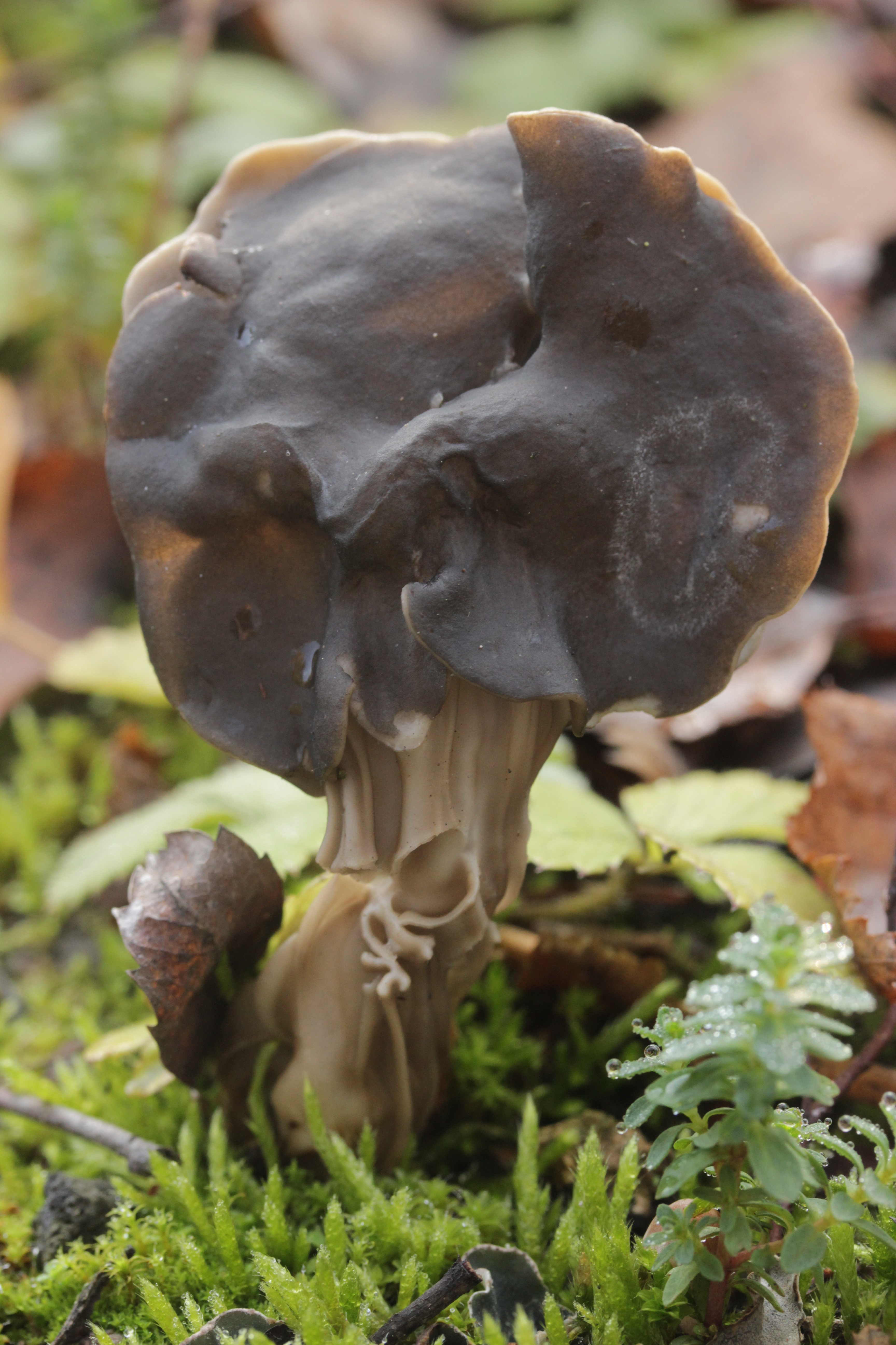 Slate Grey Saddle - Helvella lacunosa